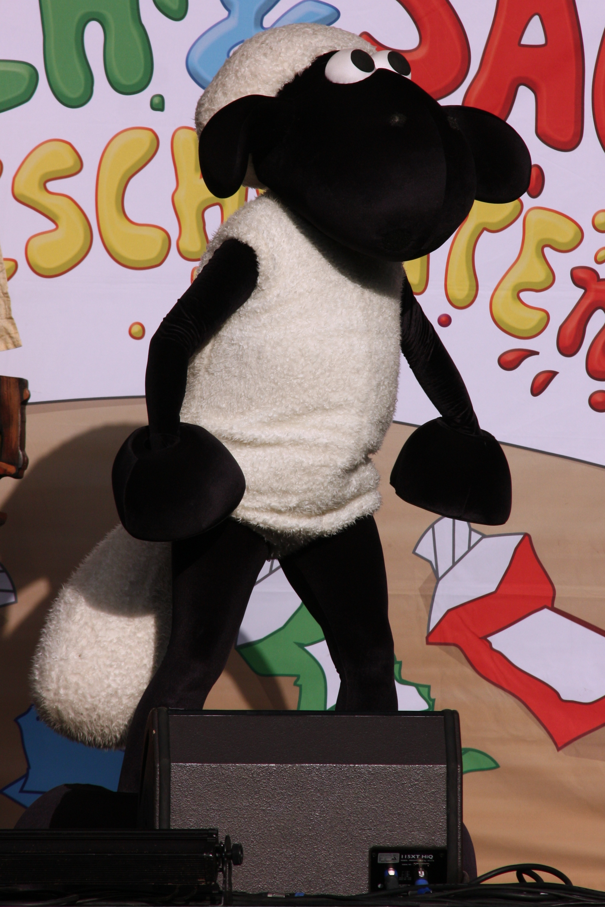 Wiesbadener Stadtfest 2013: Shaun das Schaf live zu Gast bei der Maus